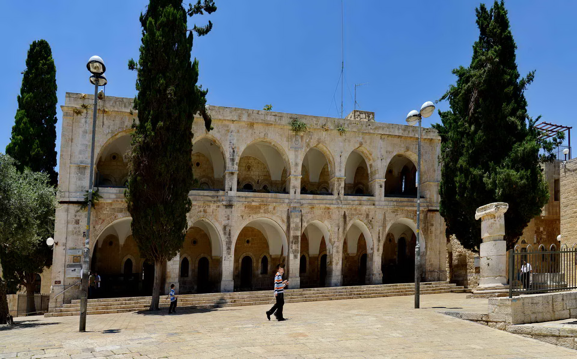 "בתי מחסה" הוא מתחם דירות לעניים שהקים כולל הו"ד בשנת 1857 ברובע היהודי בעיר העתיקה שבירושלים.